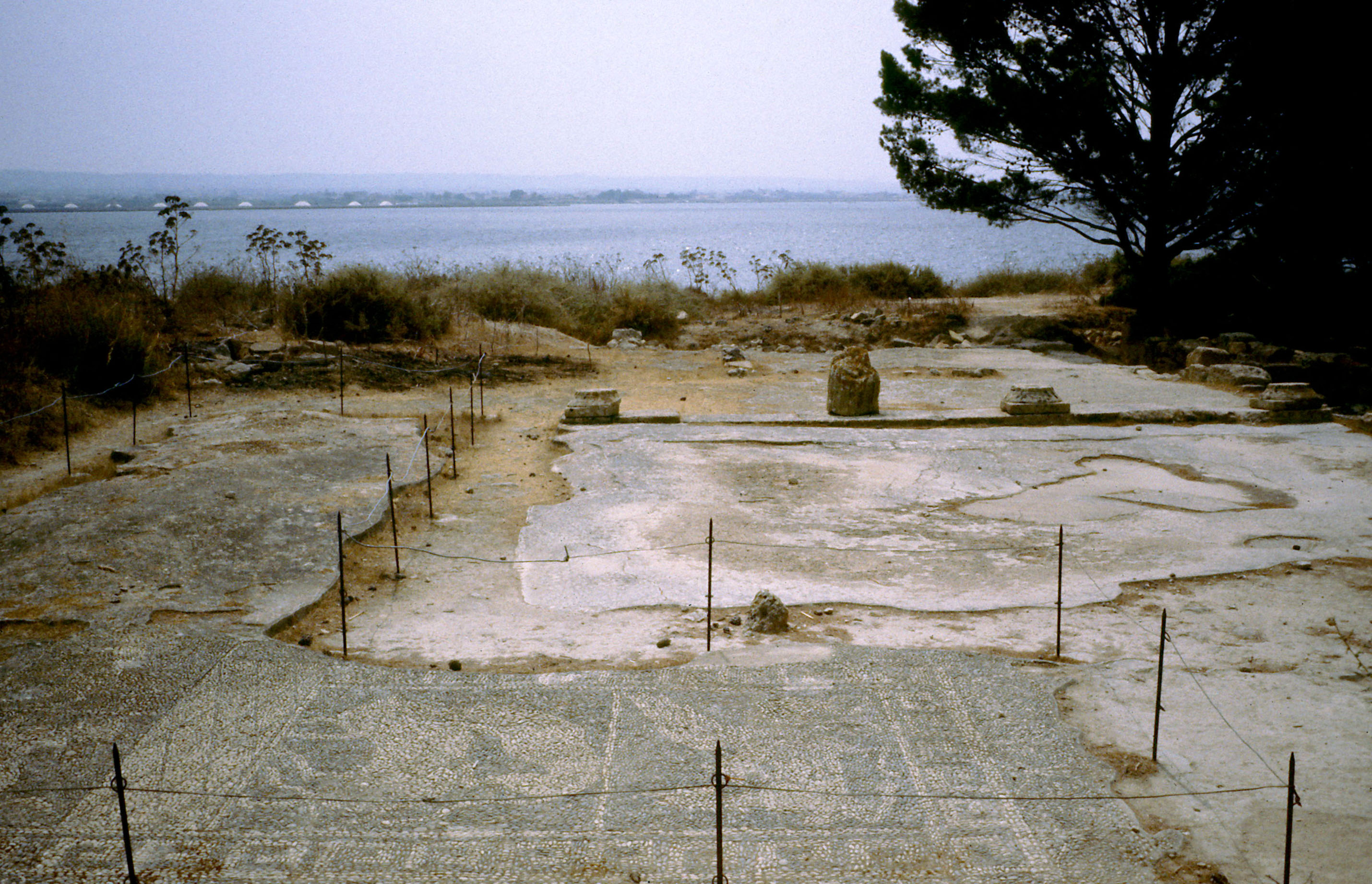 Mozia, Sicilia, la casa dei mosaici, autore Sandro Baldi, Bologna, Italia, estate 1984, fotocamera Konica autoreflex T